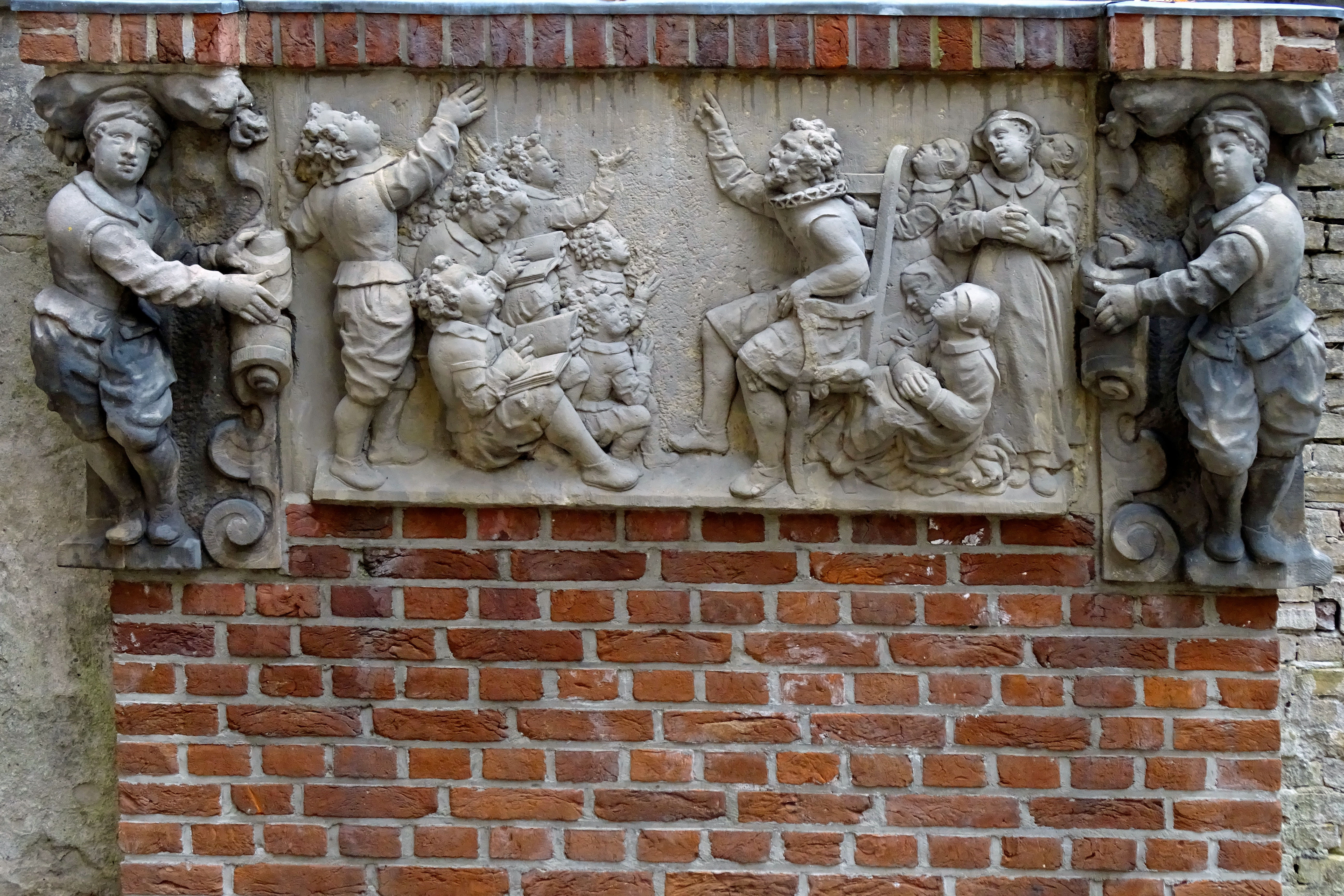 De door Gregorius Cool in 1603 vervaardigde gevelsteen van het weeshuis, geplaatst in de museumtuin in Gouda